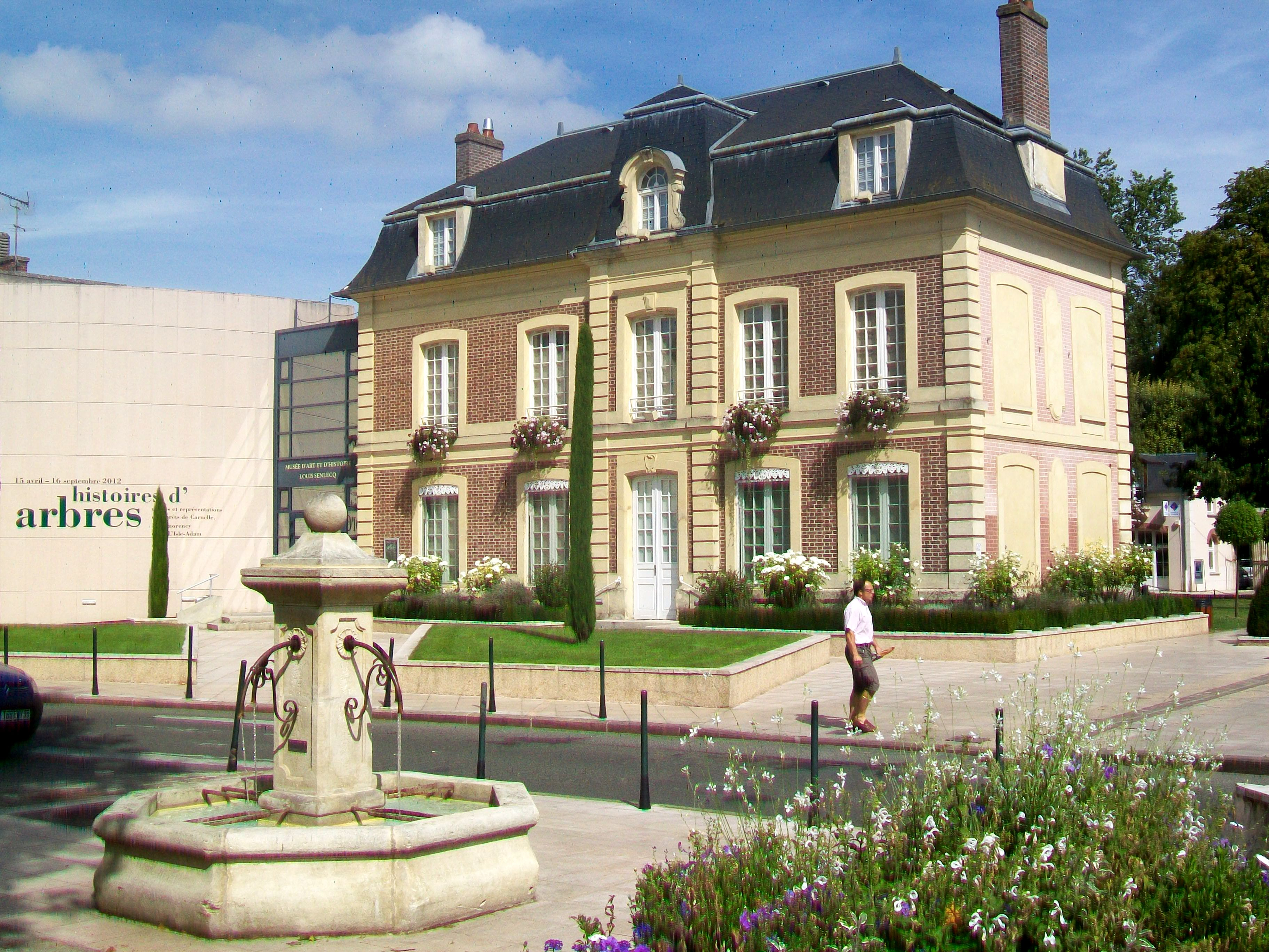 Le musée d'art et d'histoire (centre d'art Jacques-Henri Lartigue - musée Louis-Senlecq) ; façade sur la Grande rue et fontaine devant le commissariat.